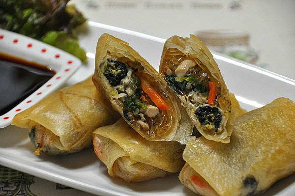 익성느 춘권임